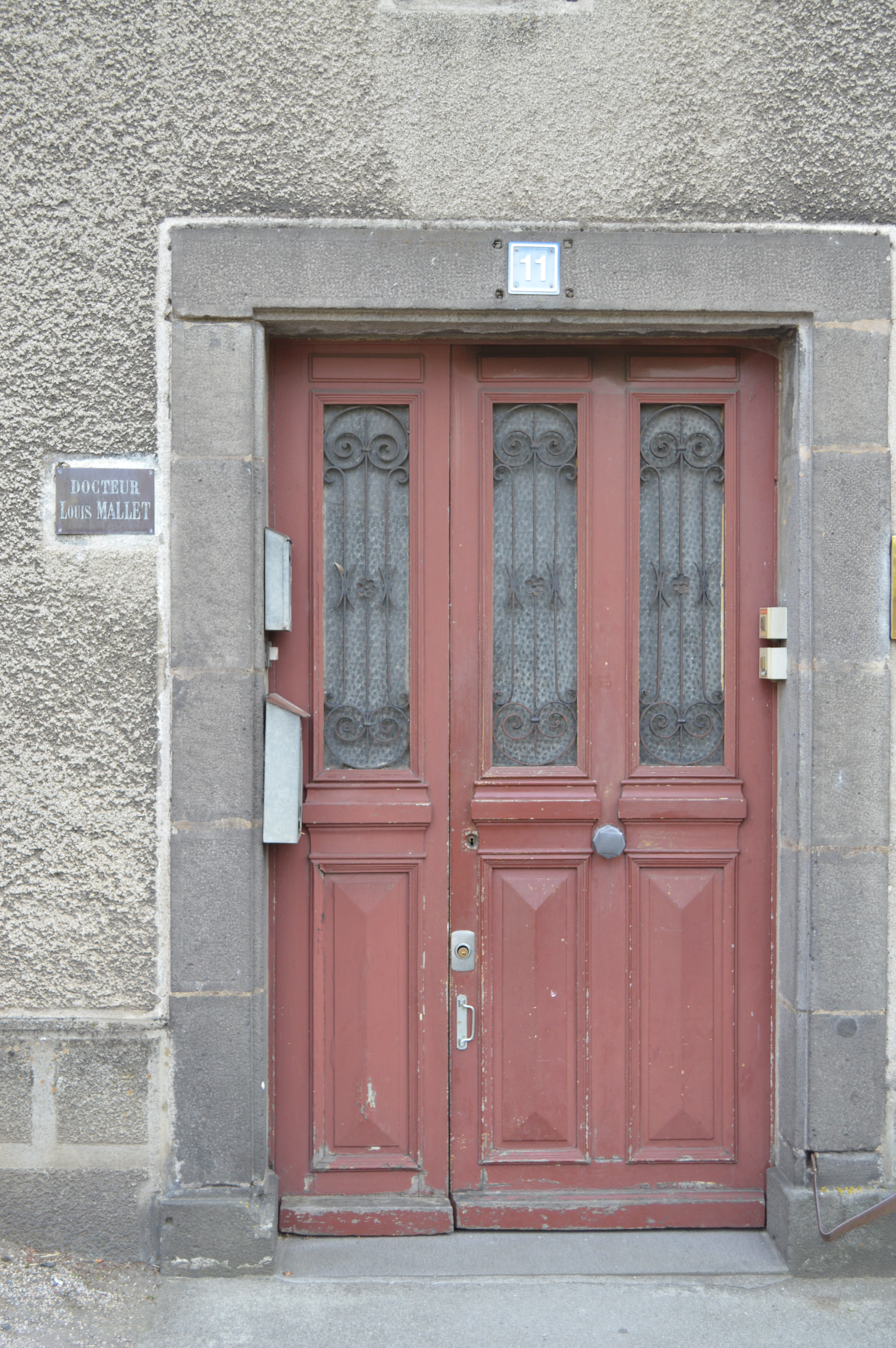 Plaque Docteur Louis Mallet au 11 avenue des orgues à Saint-Flour (ancien cabinet du docteur, ancienne adresse : 5 rue du Faubourg)